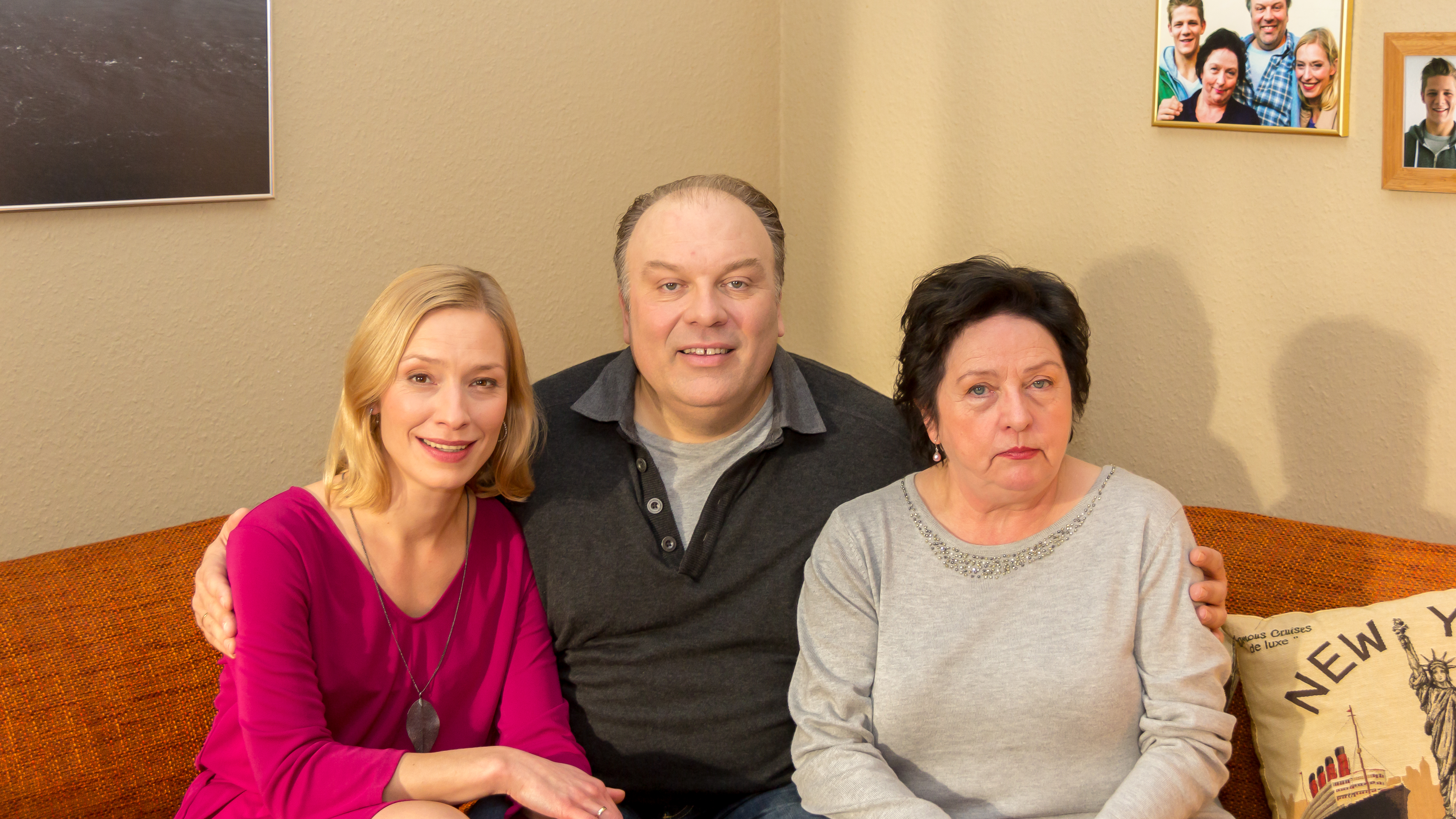 Set-Termin für die Presse zu den Dreharbeiten der 3. Staffel „Die LottoKönige“. Gedreht wurde in einem Mehrfamilienhaus in Köln-Stammheim. Foto: Waldemar Kobus als Lottogewinner „Rudi König“, Sandra Borgmann als seine Frau „Claudia König“ und Beate Abraham als „Oma Helga“